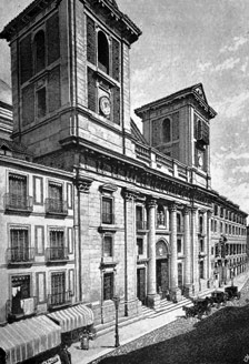 Colegiata de San Isidro (Old picture). Madrid, Spain